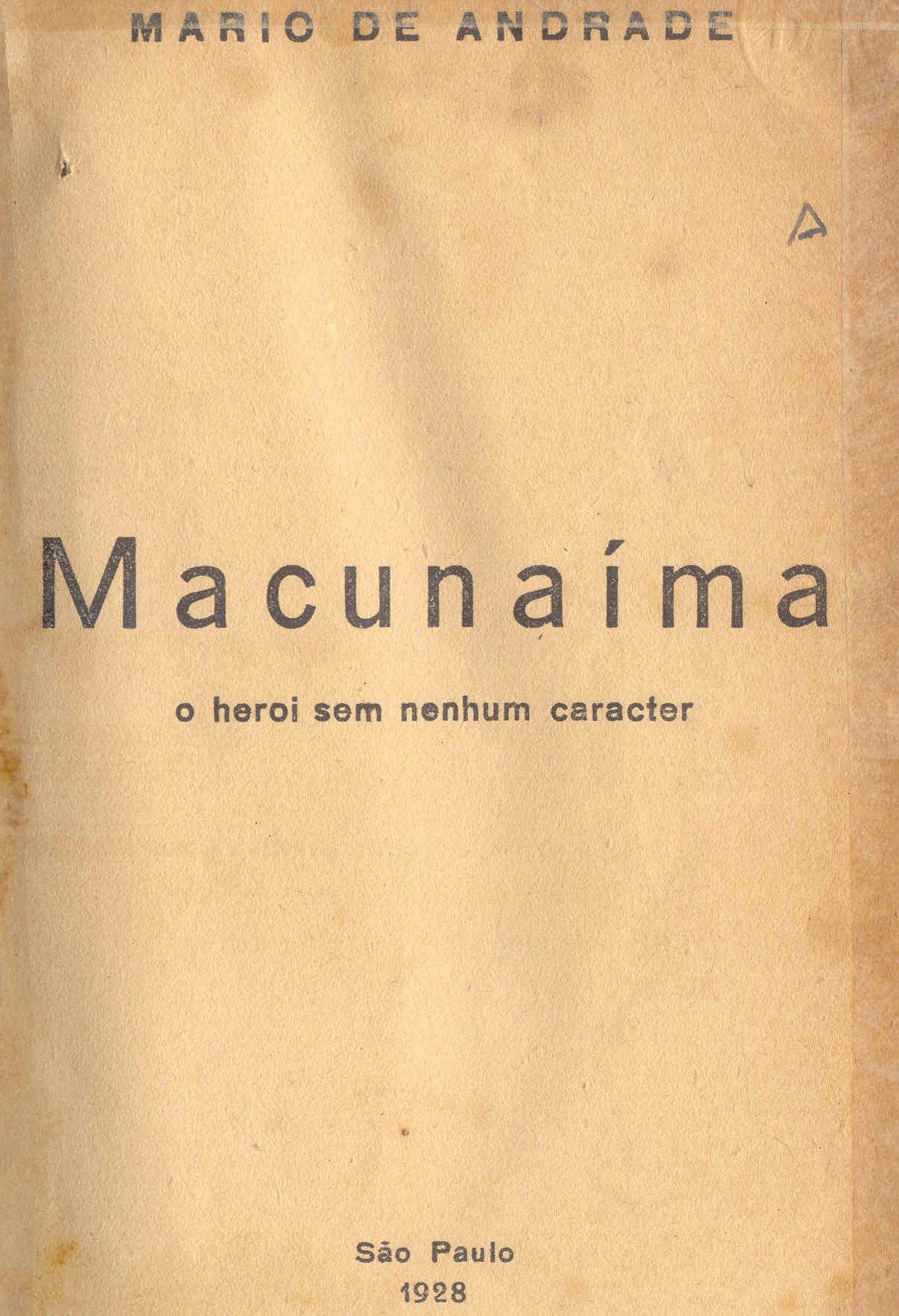 Capa da primeira edição de Macunaíma